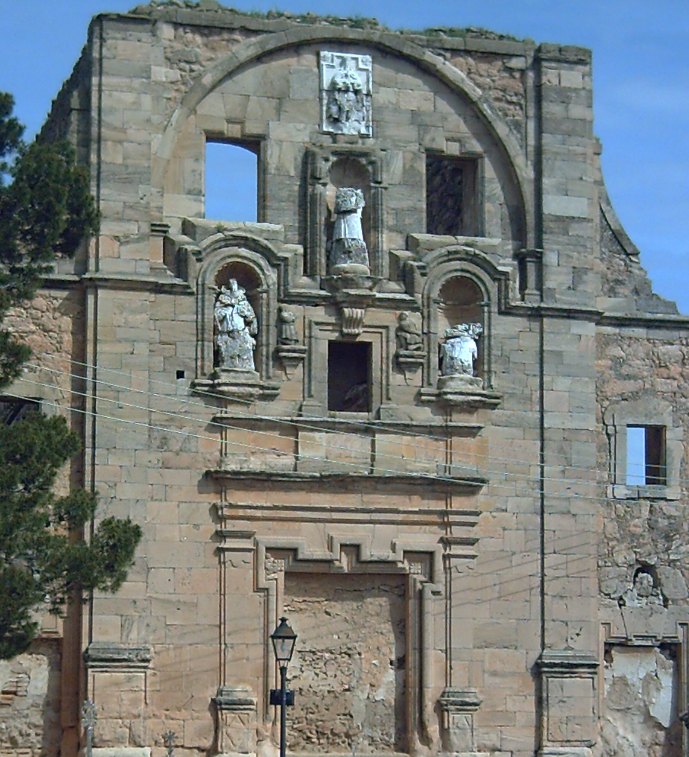 Ex convento de Trinitarios en Santa Cruz de la Zarza (Toledo, España) // Convent in Santa Cruz de la Zarza (Spain)